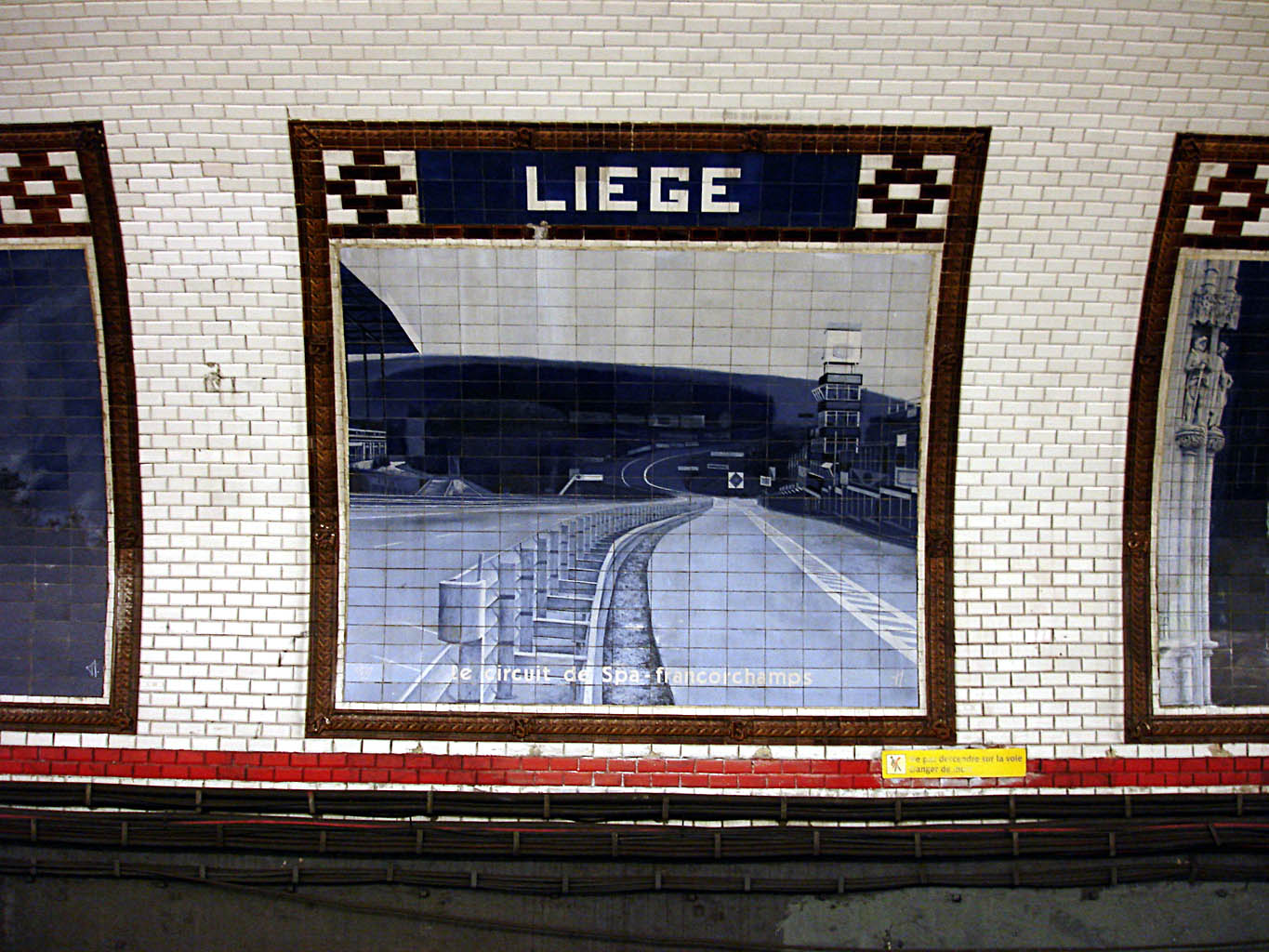 Station Liège, de la ligne 13 du métro de Paris, France.